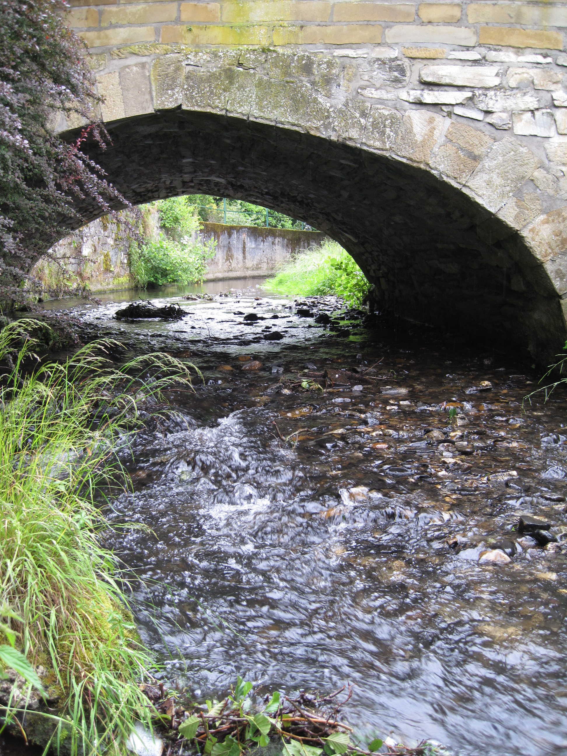 Der Fischbach (Nahe) in Herrstein.